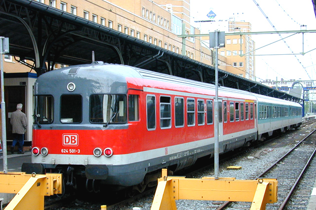 DB treinstel 624 501 van het type 624 te Station Groningen.